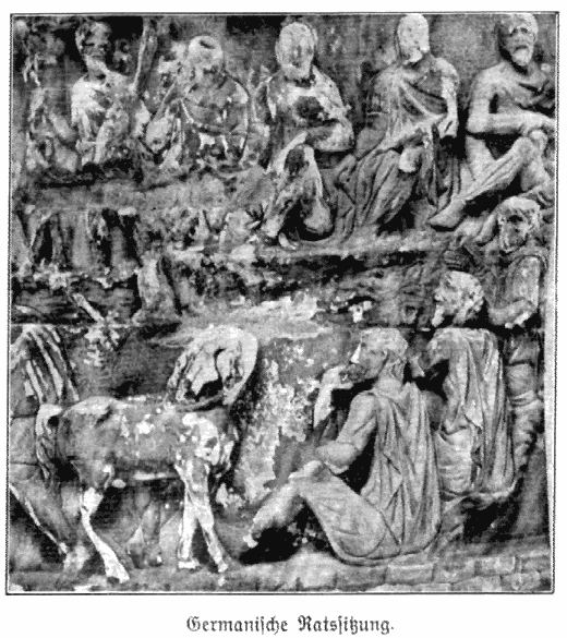 Germanische Ratssitzung. Abbildung aus "Deutsche Kultur des Mittelalters in Bild und Wort" von Dr. Paul Herre. Verlag von Quelle & Meyer in Leipzig 1912. Leistungsschutzrechte erloschen. Lizenz: Public Domain. Alternatives Bild